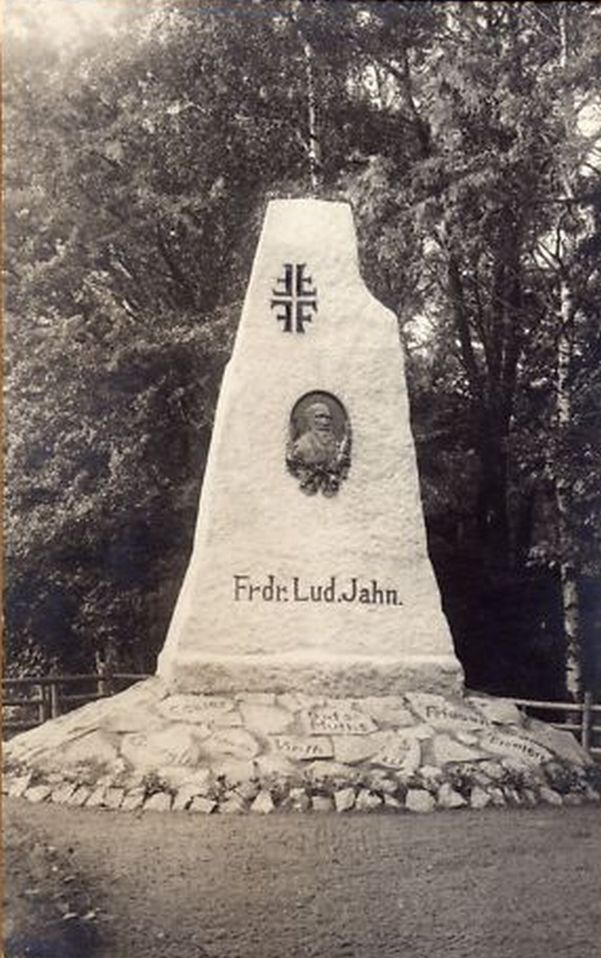 Pomnik Friedricha Ludwiga Jahna w Białej